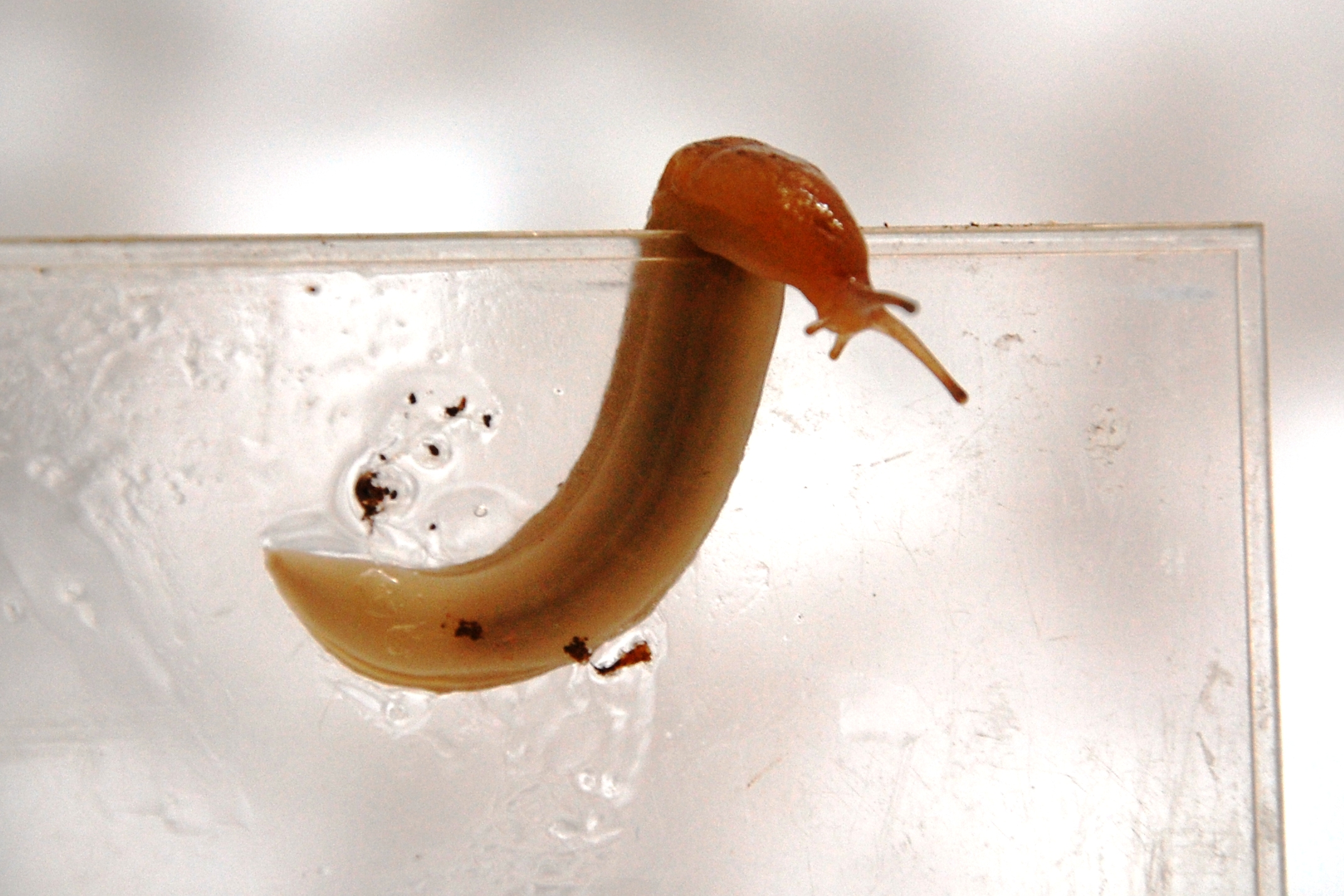 Lehmannia melitensis Sicily